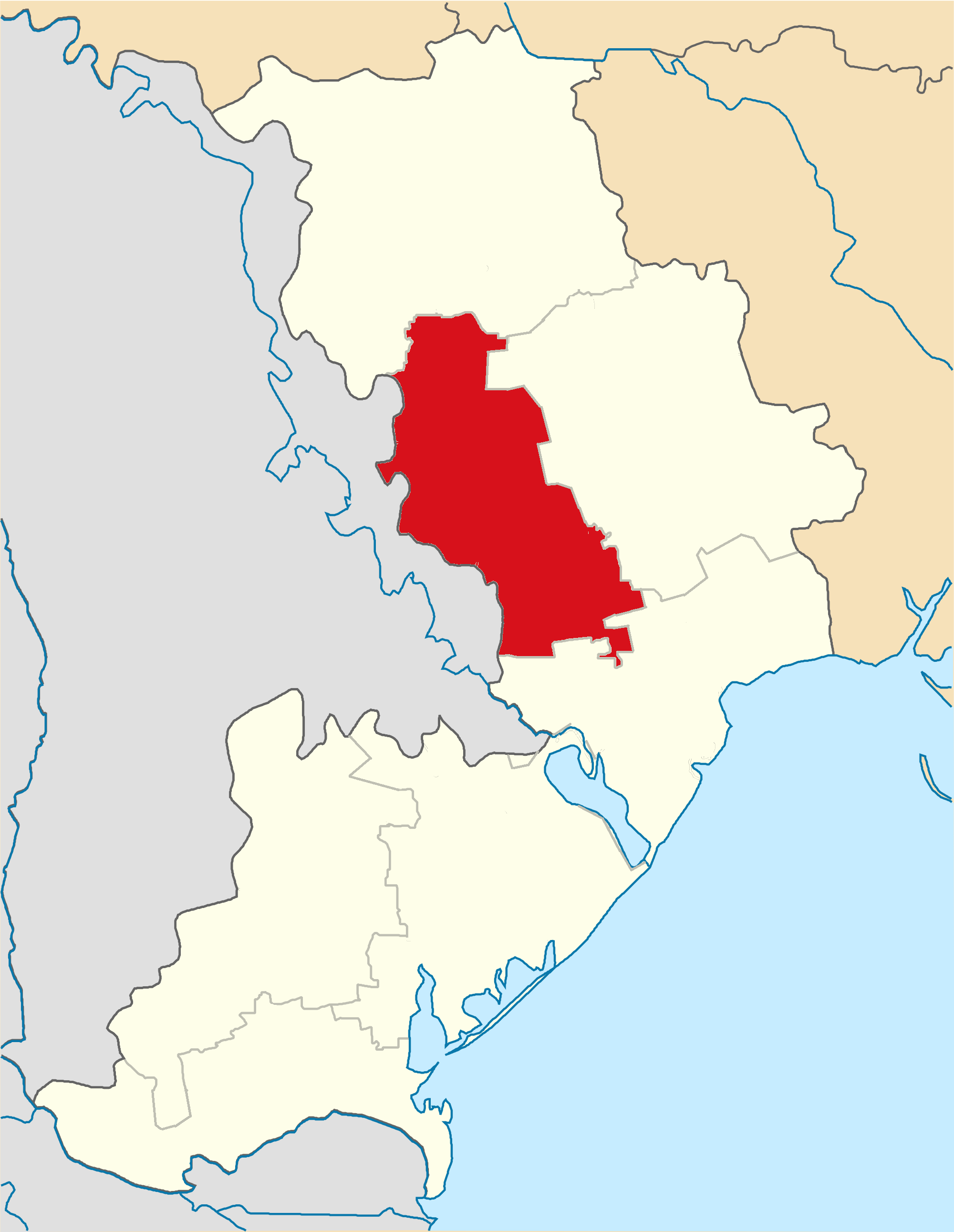 Раздельнянский район Одесской области с 2020 года